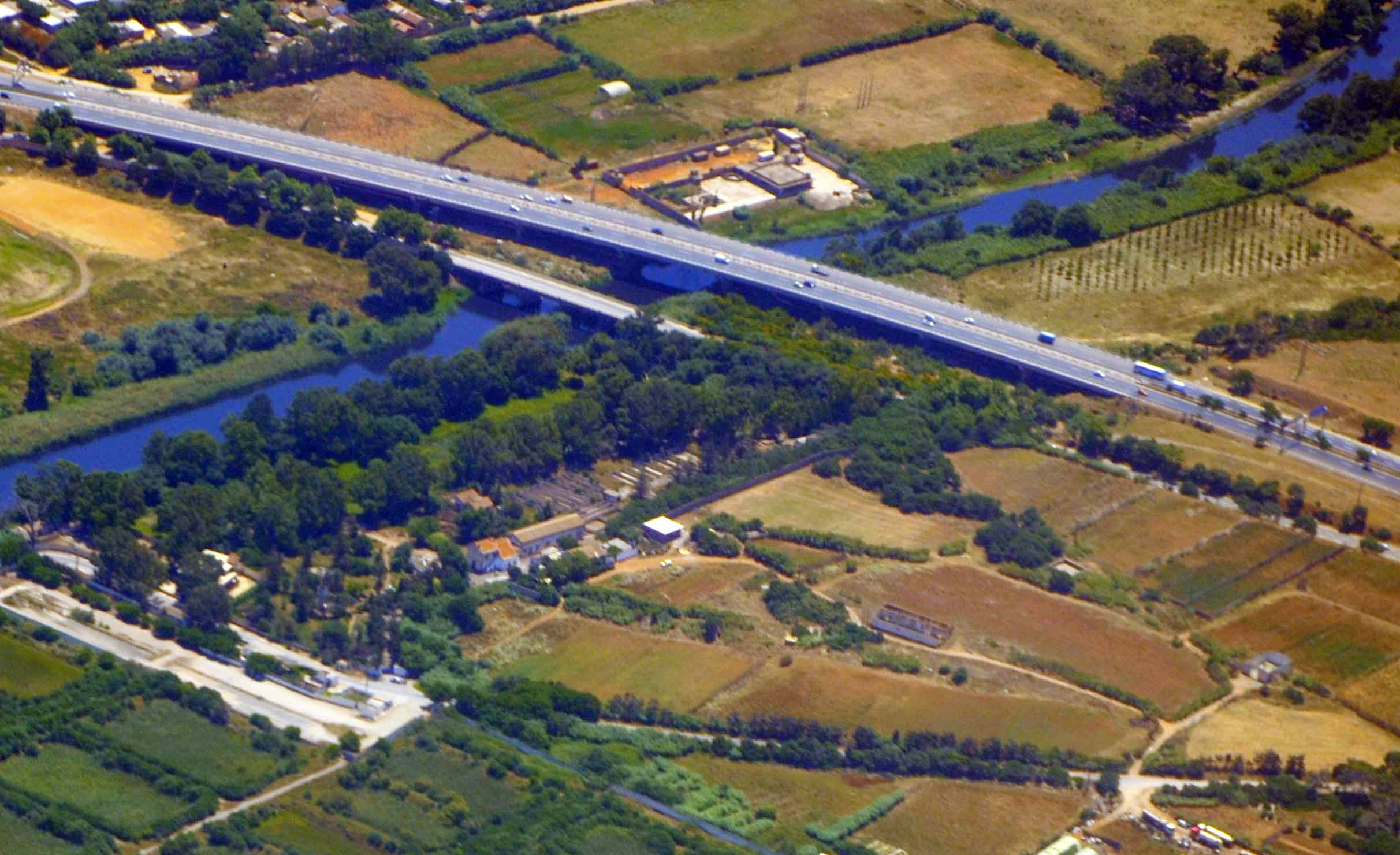 L'Oued Mazafran près de son embouchure